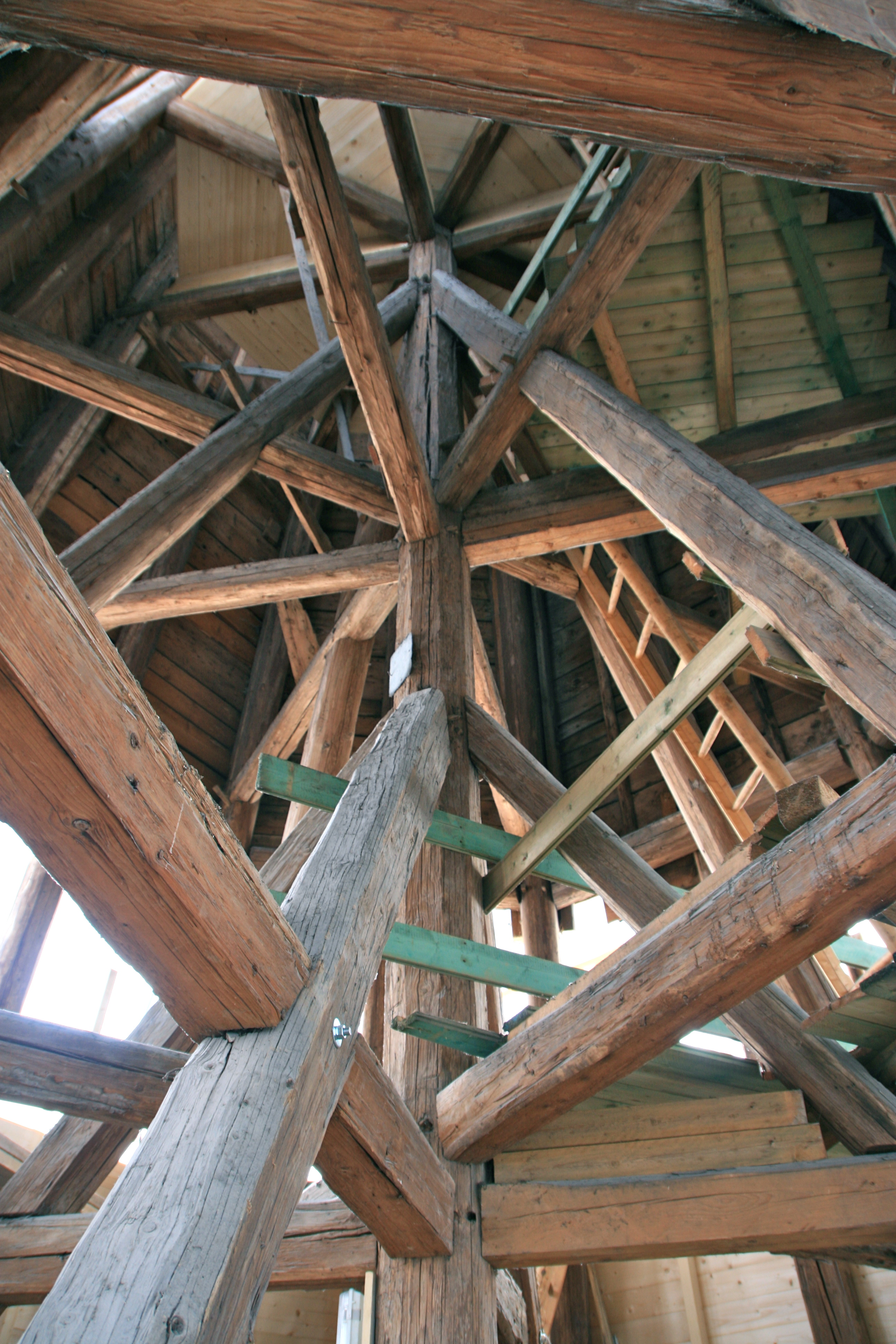 Sanierung Dachstuhl Klosterkirche Wennigsen 1